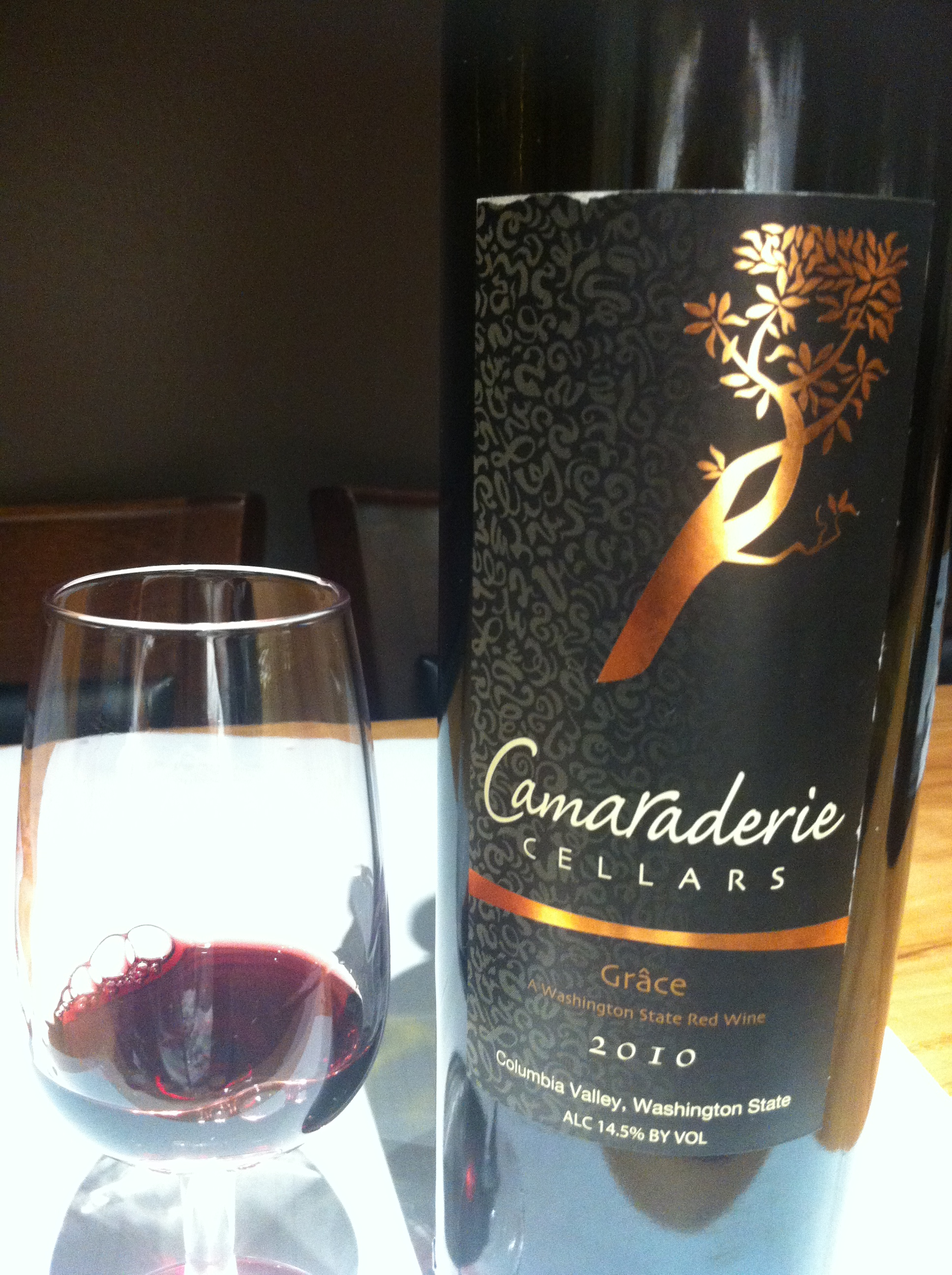 A red blen